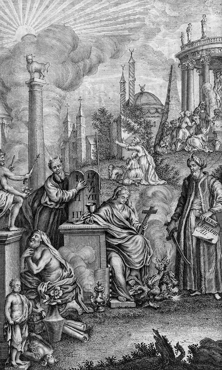 TItelkupfer aus: Thomas Brougthon; Historisches Lexicon aller Religionen seit der Schöpfung der Welt bis auf gegenwärtige Zeit: worinnen die heydnischen, jüdischen, christlichen und gottesdienstlichen Lehrbegriffen, Cerimonien, Gebräuche, Oerter, Personen und Schriften, nebst ihren Schicksalen beschrieben werden. Aus den besten Schriftstellern zusammengetragen, Dresden und Leipzig, Walther, 1756.